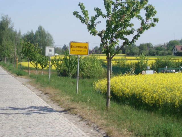 Ortseingang Elstertrebnitz von Profen kommend